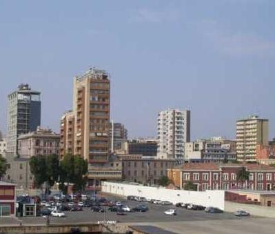 Cagliari, Italia. Palazzi nel quartiere Marina/Bonaria